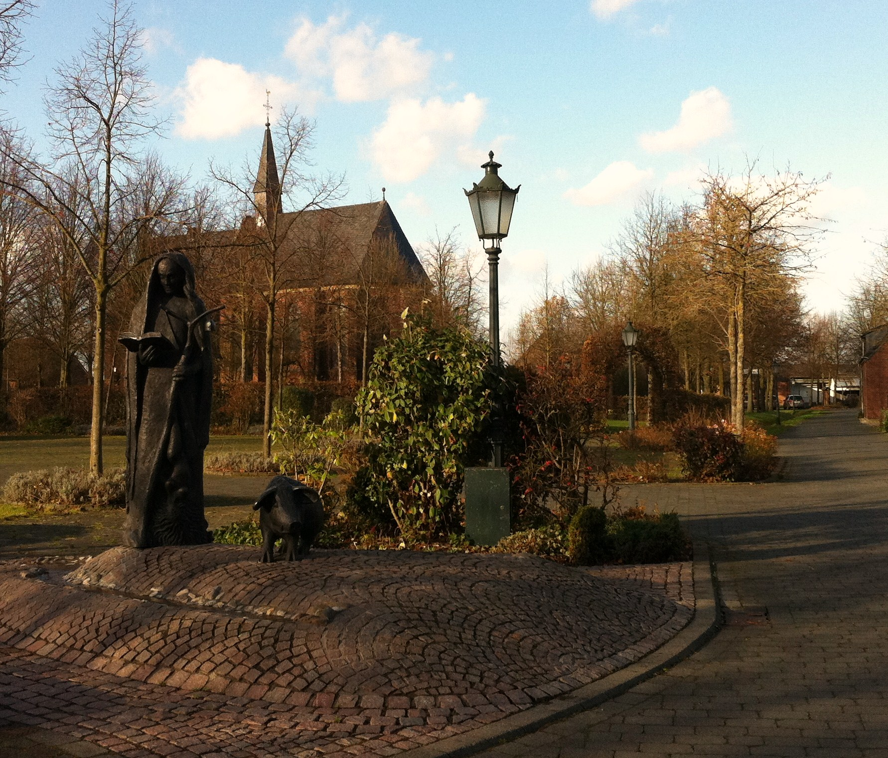 Dorfplatz